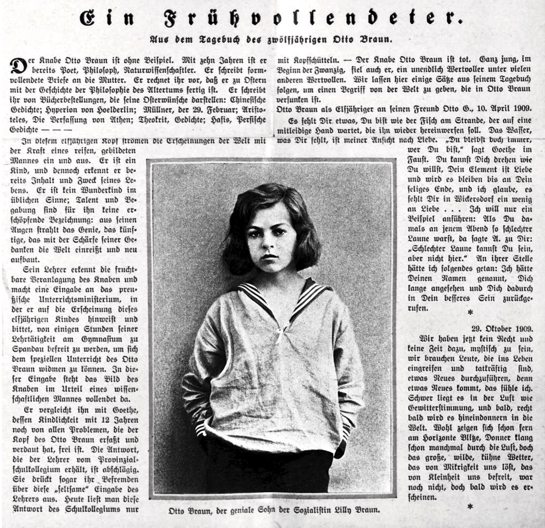 Zeitungsartikel aus Die praktische Berlinerin vom März 1910 über Otto Braun (1897–1916). In der 2. Spalte werden zwei Briefe an Otto Gründler (1894–1961) zitiert, mit dem er sich 1907/08 in der Freien Schulgemeinde Wickersdorf angefreundet hatte.